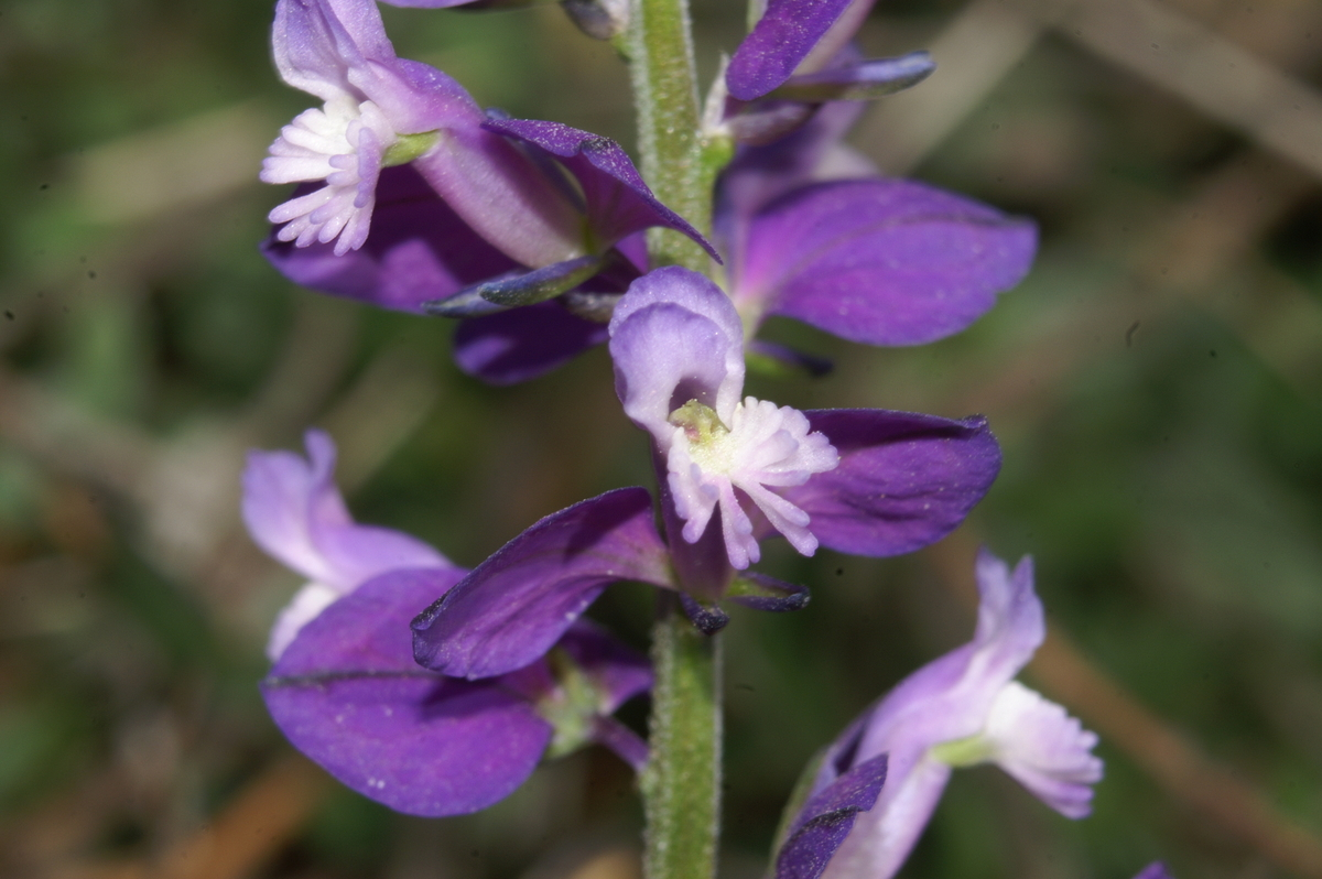 Navadna grebenuša na Vremščici.